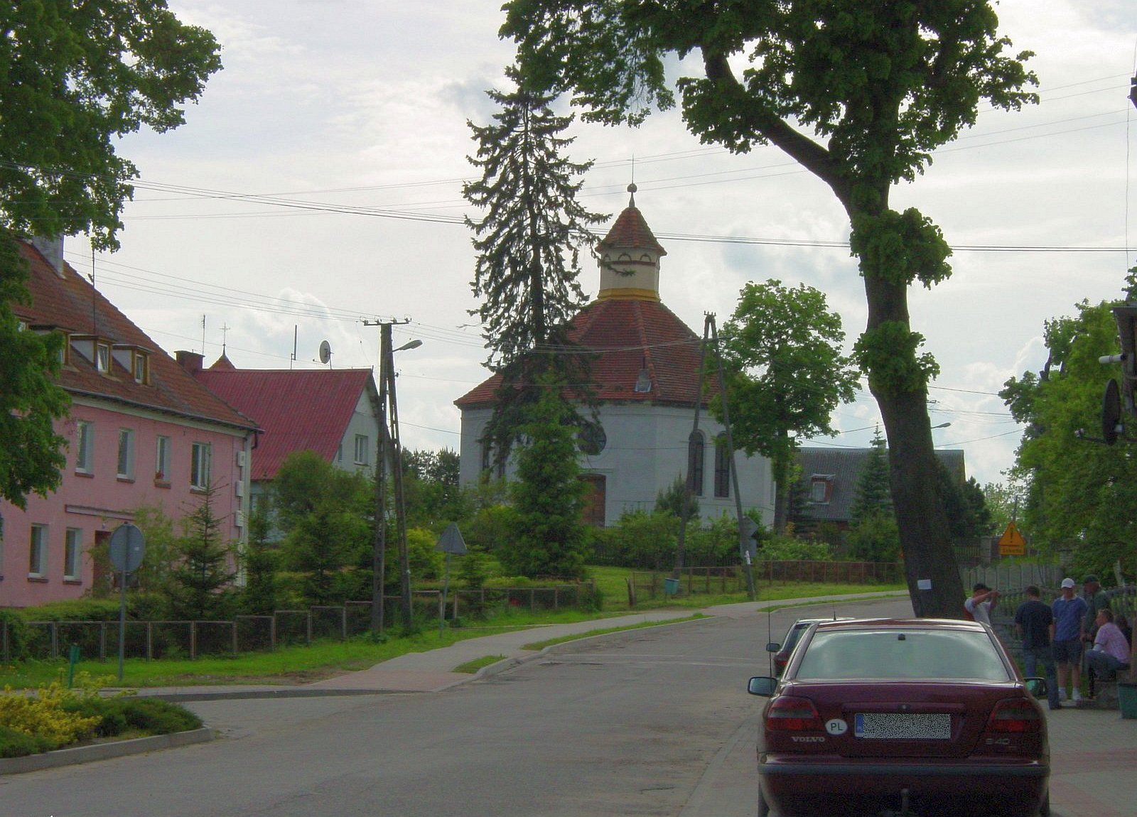 Kościół parafialny pw. Chrystusa Króla.